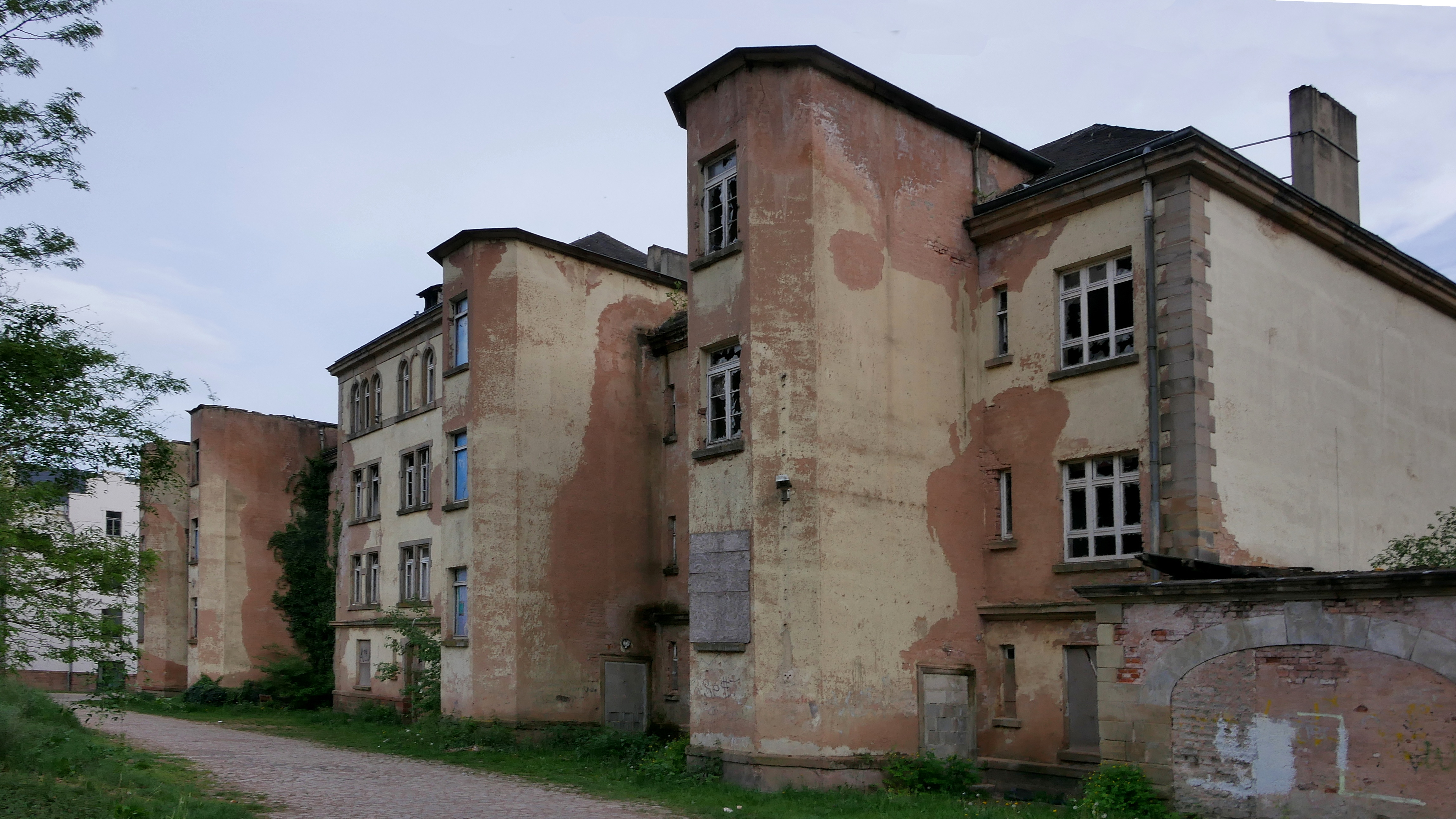 Gneisenau Kaserne (Städtische Kaserne) Trier. Mittleres Gebäude an der Gneisenaustraße